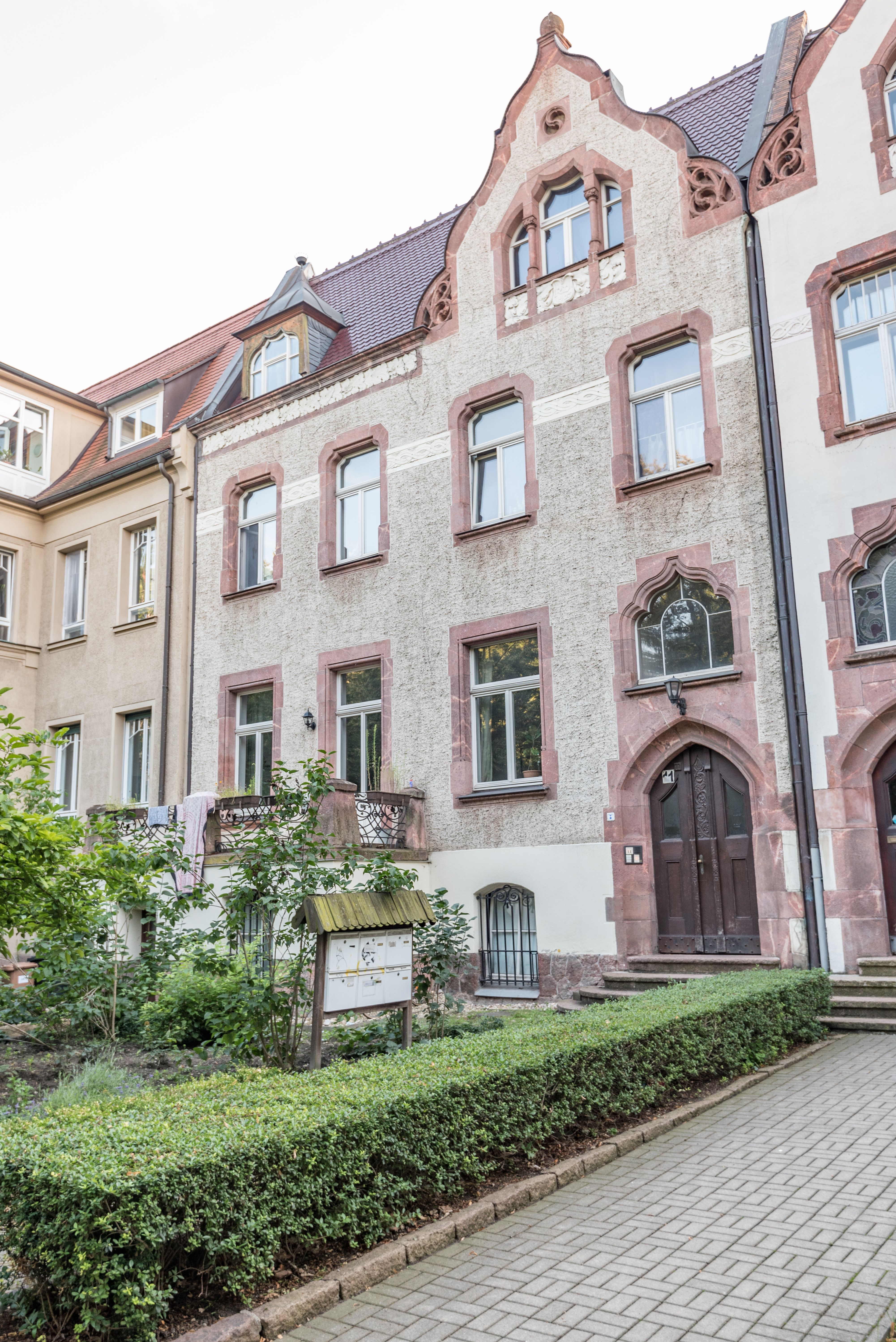 Halle (Saale), Robert-Franz-Ring 11